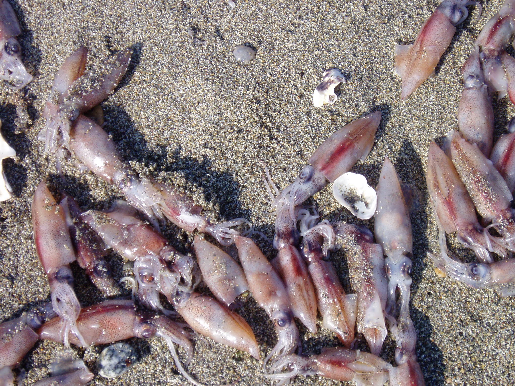 浜黒崎海岸に身投げするホタルイカ